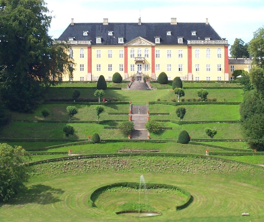 Schloss Ledreborg, Dänemark